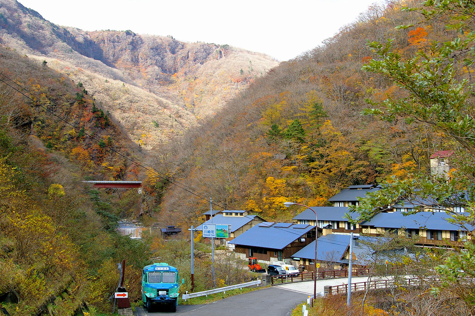 Gaga hot spring.